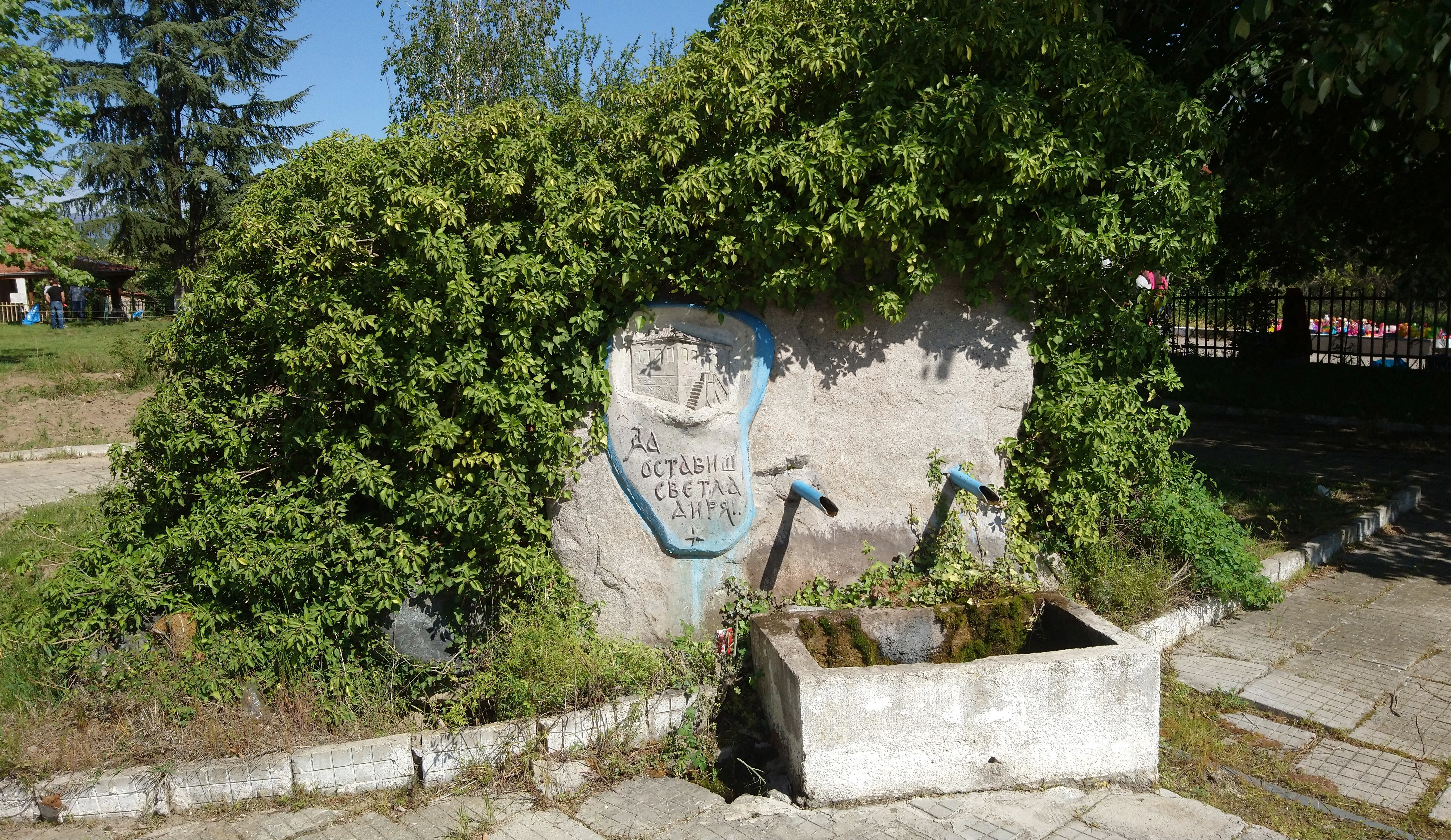 Чешмата в центъра на село Капатово с надпис "Да оставиш светла диря"